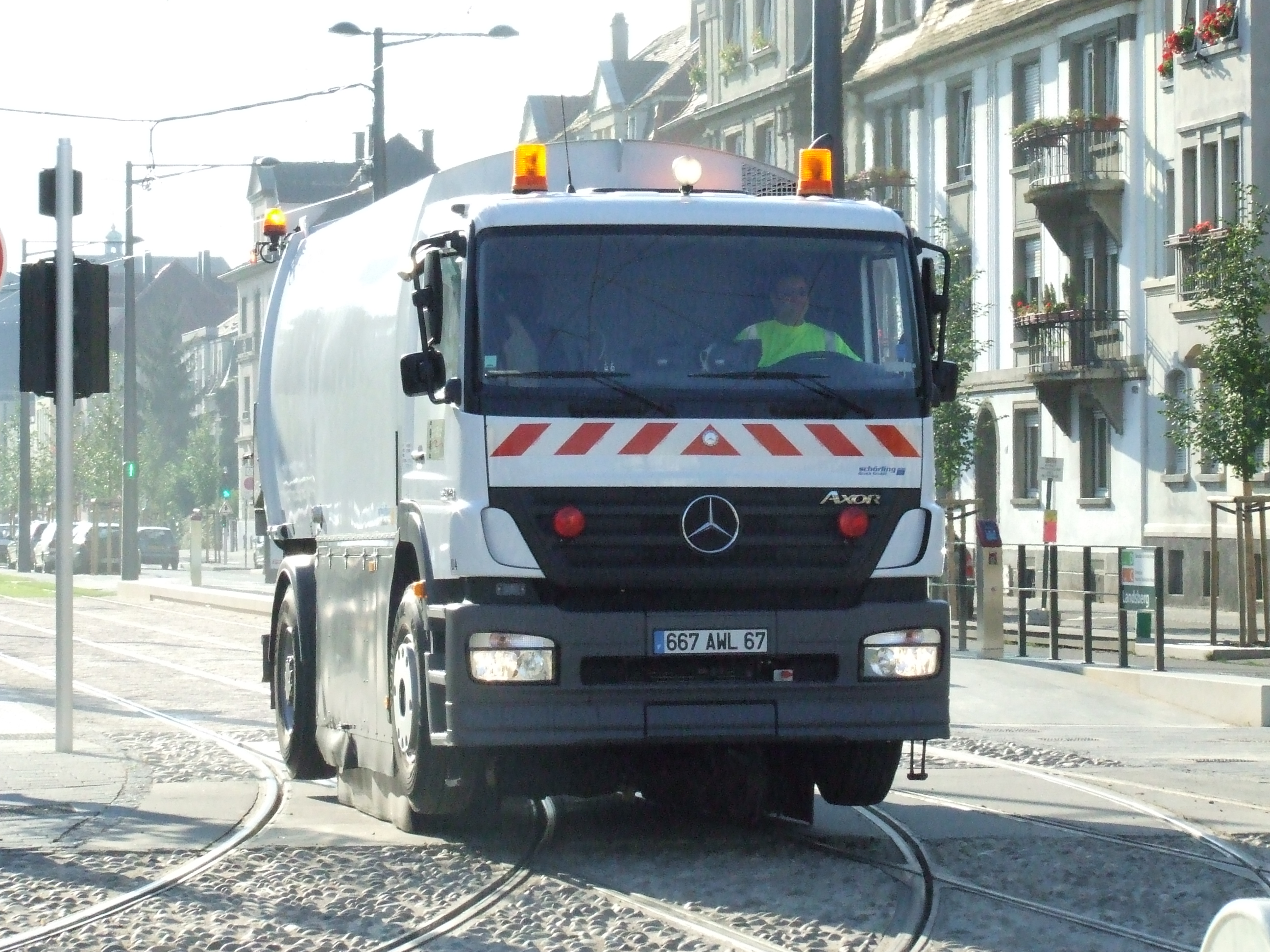 Camion aspirateur de rails / Aspirail du réseau de Tramway de Strasbourg